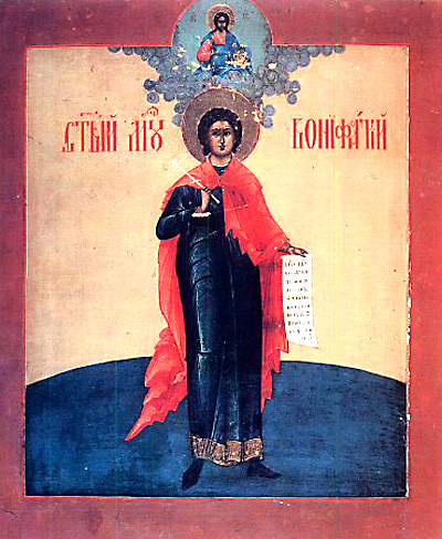 Ikone heilige Bonifatius aus Tarsus